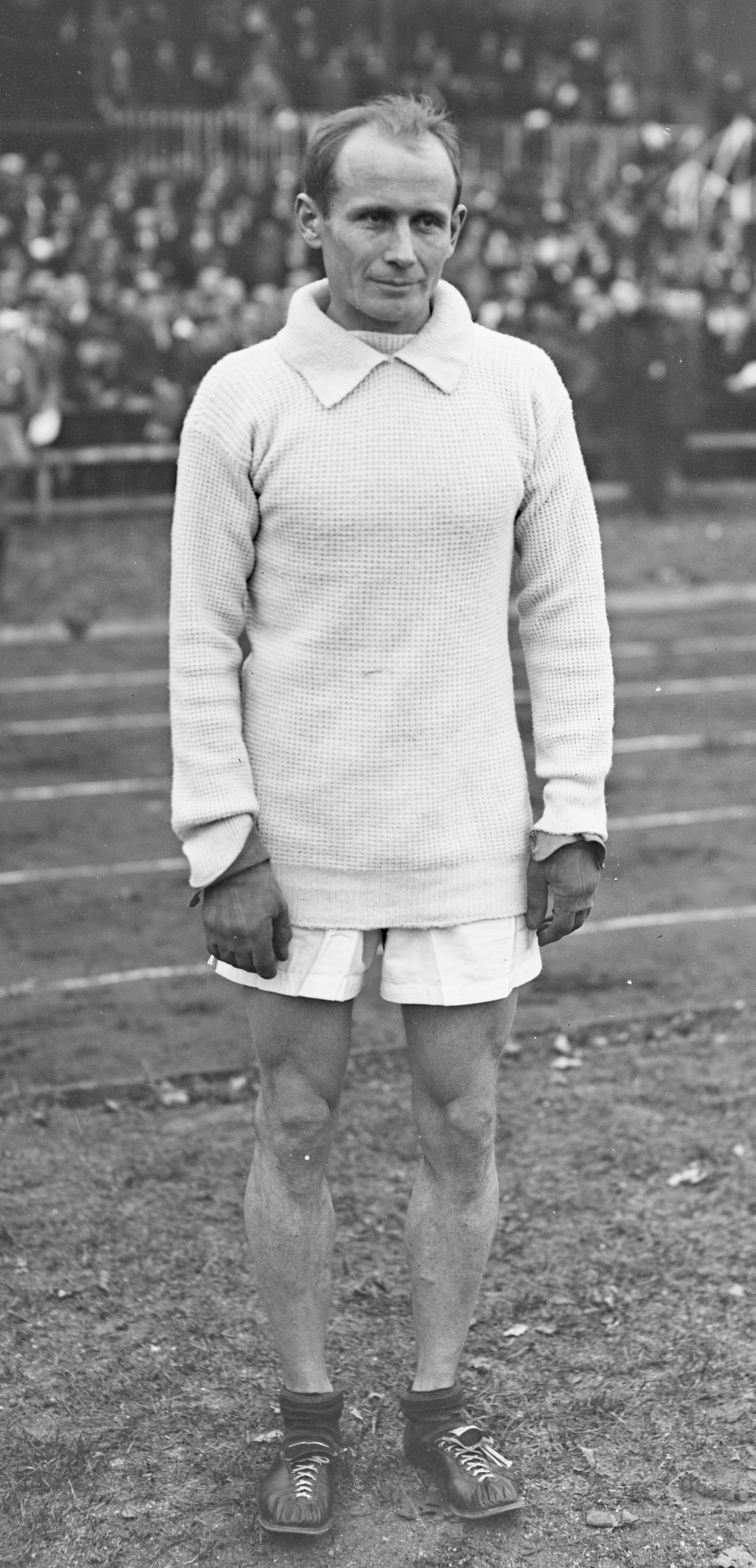 Colombes, 1/11/20, Hannes Kolehmainen [coureur à pied].